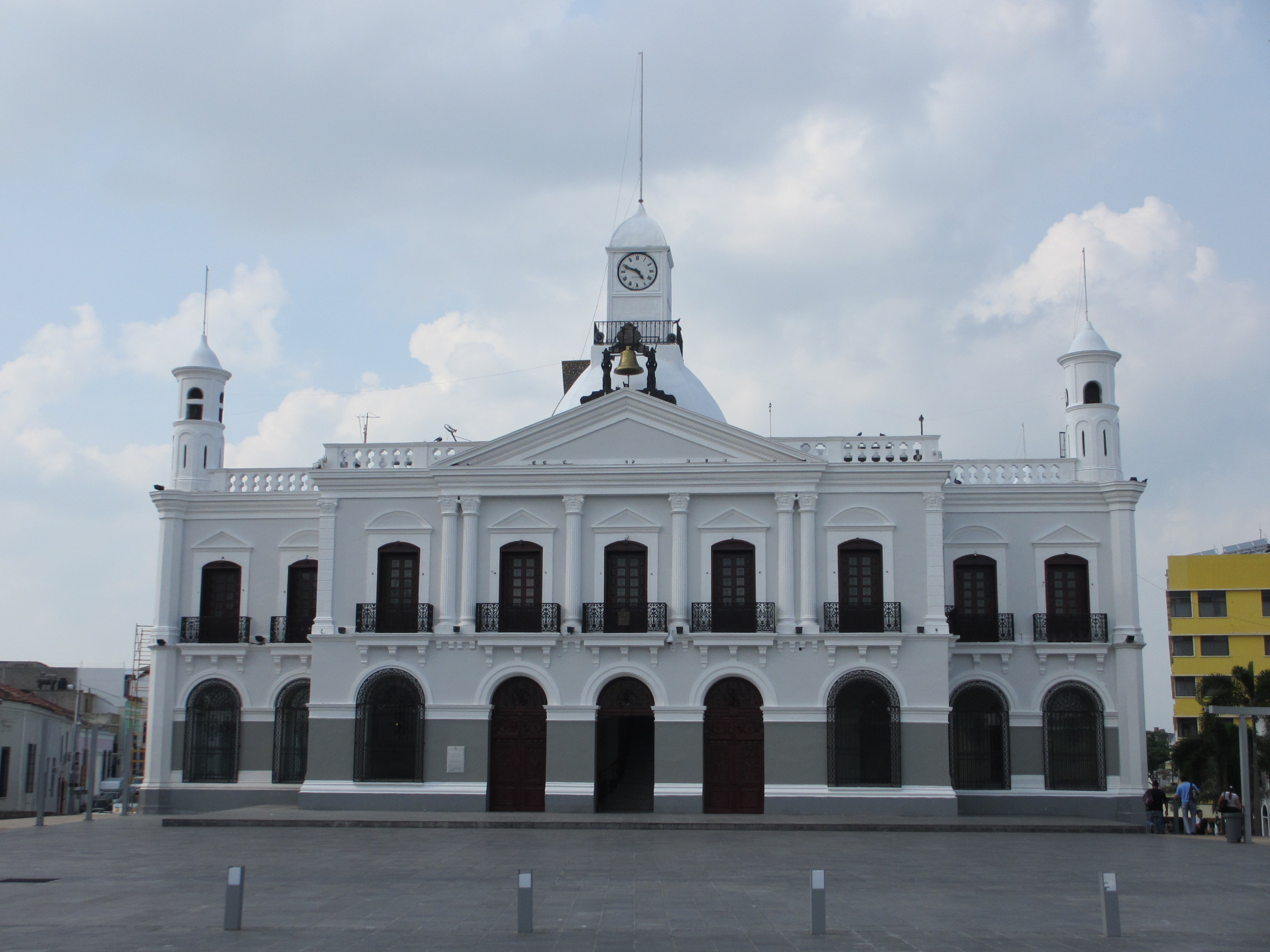 Edificio del Palacio de Gobierno del estado de Tabasco. Su construcción inició en 1884 y se inauguró el 13 de diciembre de 1894 por el gobernador Simón Sarlat Nova. Vilalhermosa, Tabasco, México.